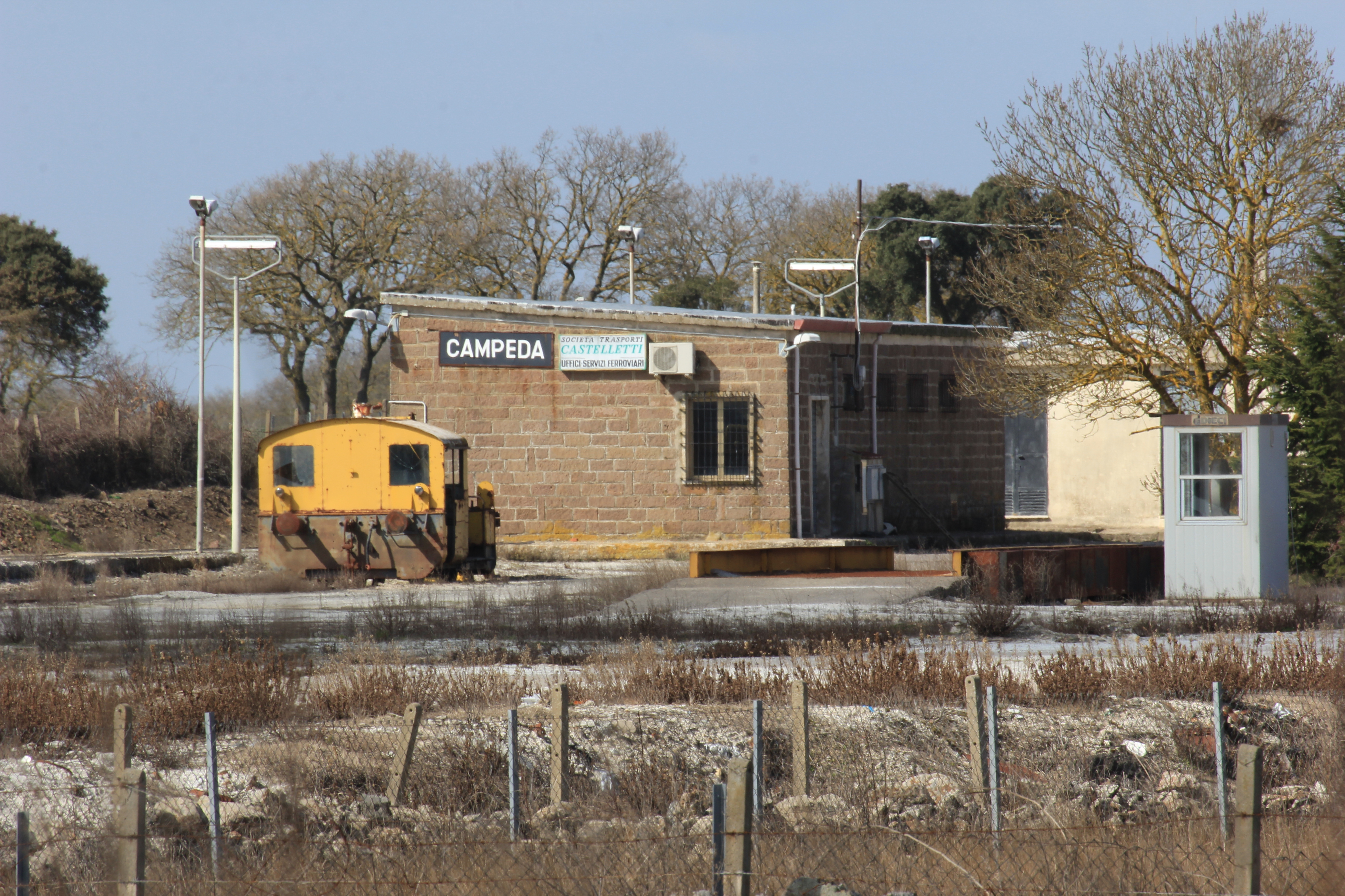 Macomer - Stazione di Campeda